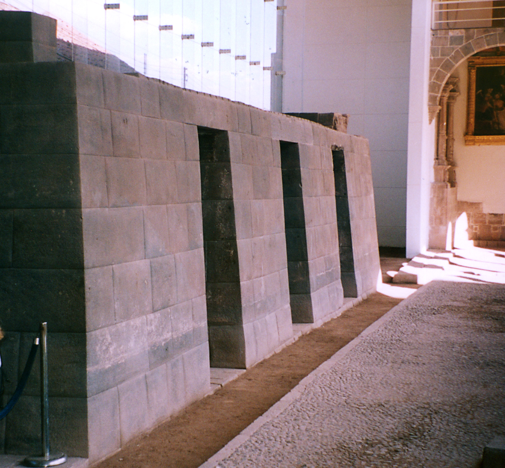 Inca wall, now inside the Coricancha/Convento de Santo Domingo, Cusco, Peru